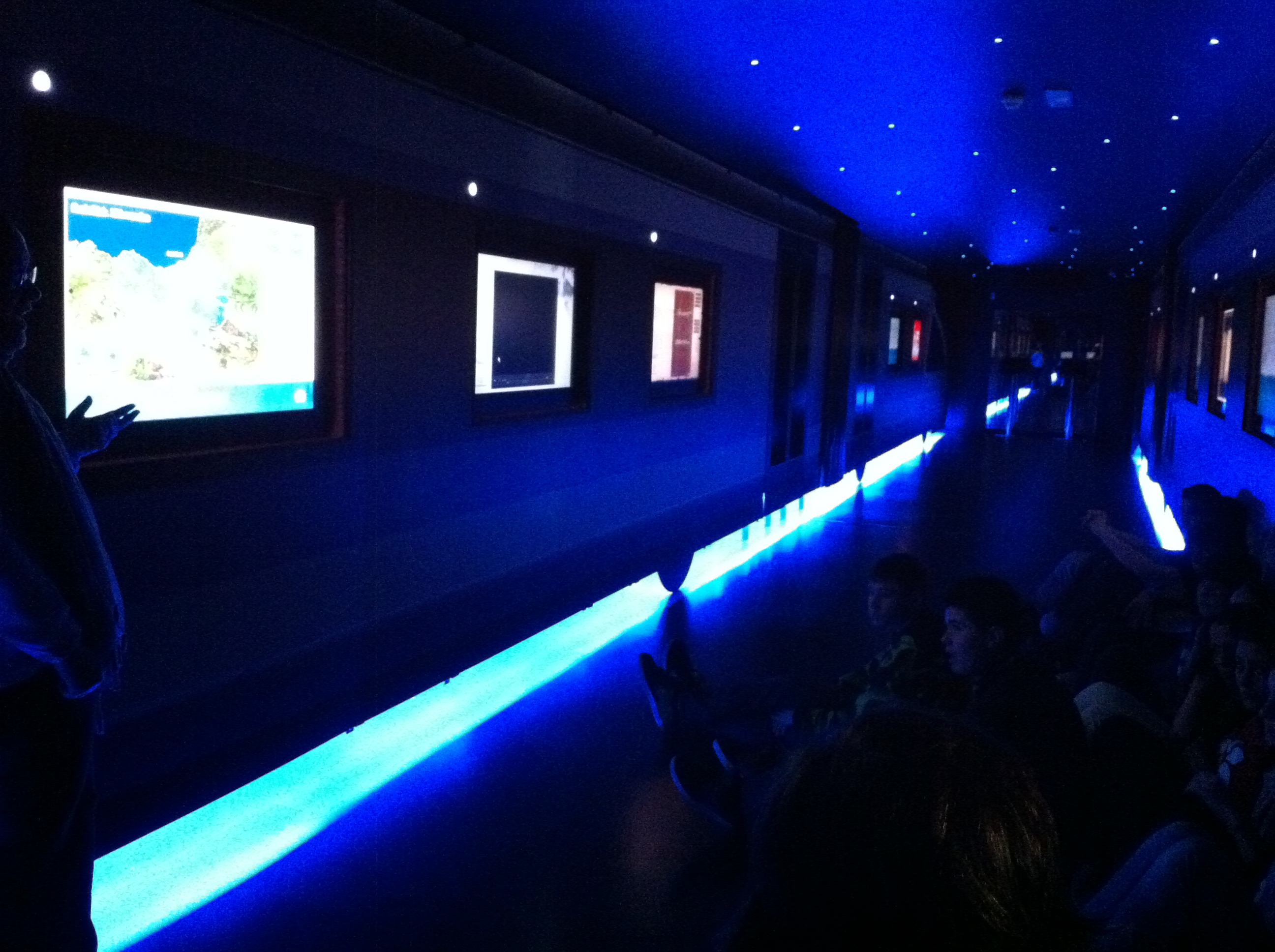 Euskara, bat eta asko eta Euskara, atzo eta gaur trenak.